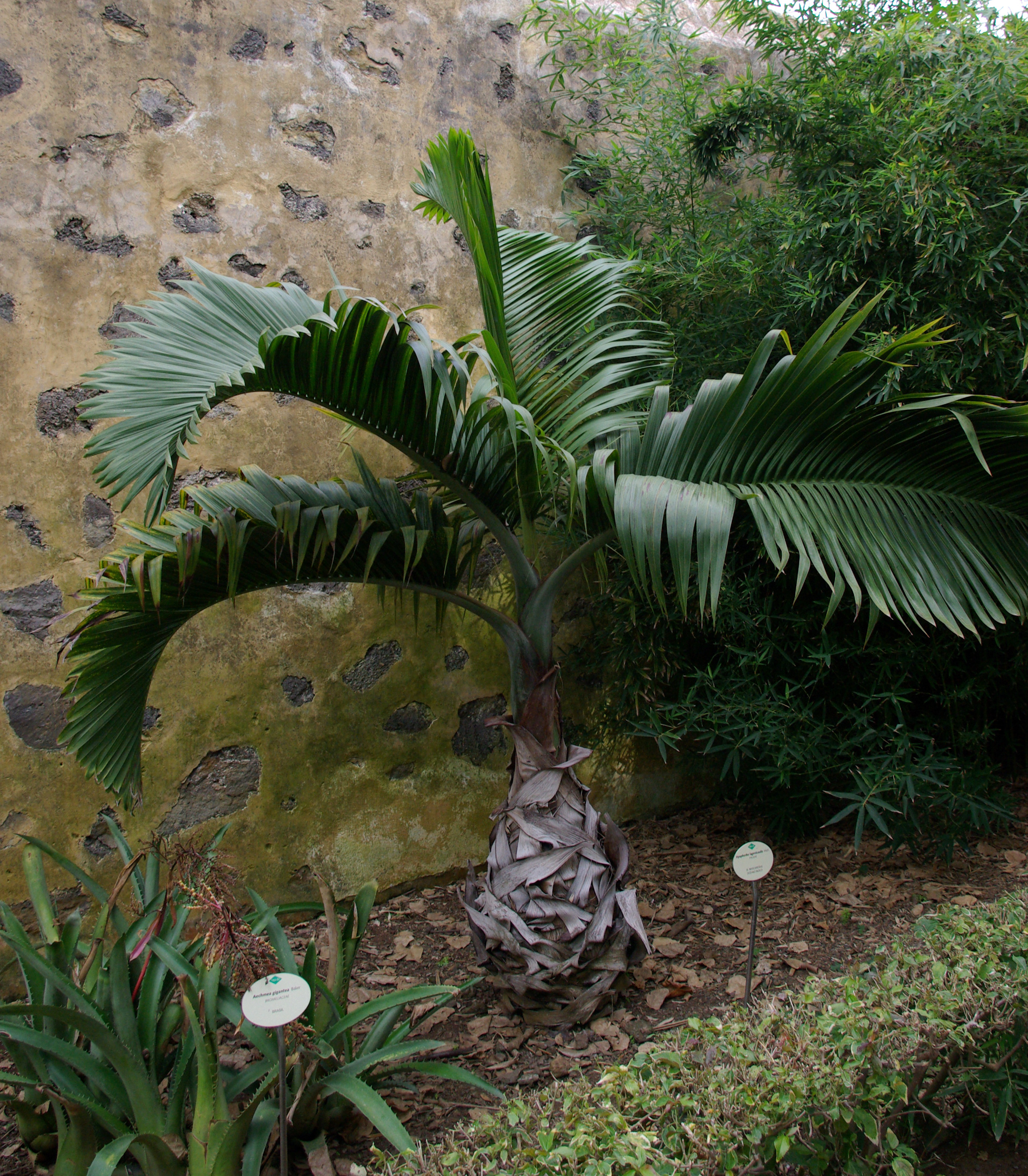 Hyophorbe lagenicaulis im Botanischen Garten von Puerto de la Cruz, Teneriffa